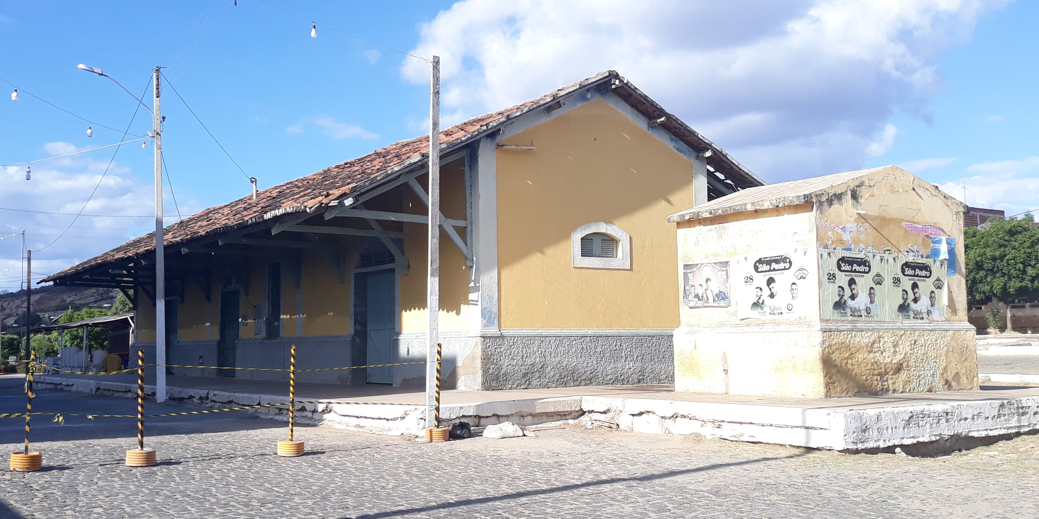 Estação ferroviária de Alexandria, no Rio Grande do Norte (Brasil), da Estrada de Ferro Mossoró-Sousa, hoje desativada